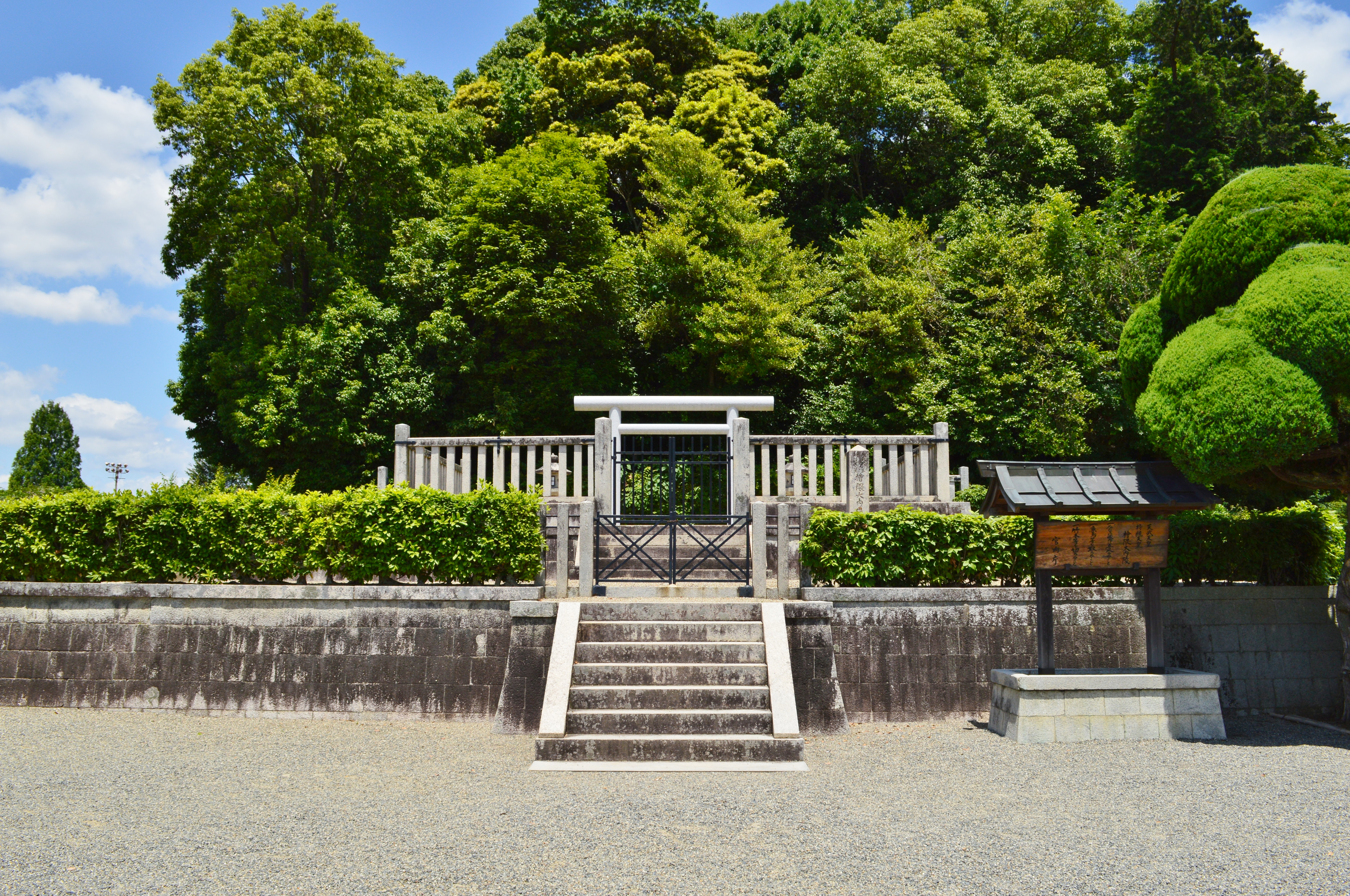 天武天皇・持統天皇檜隈大内陵 拝所